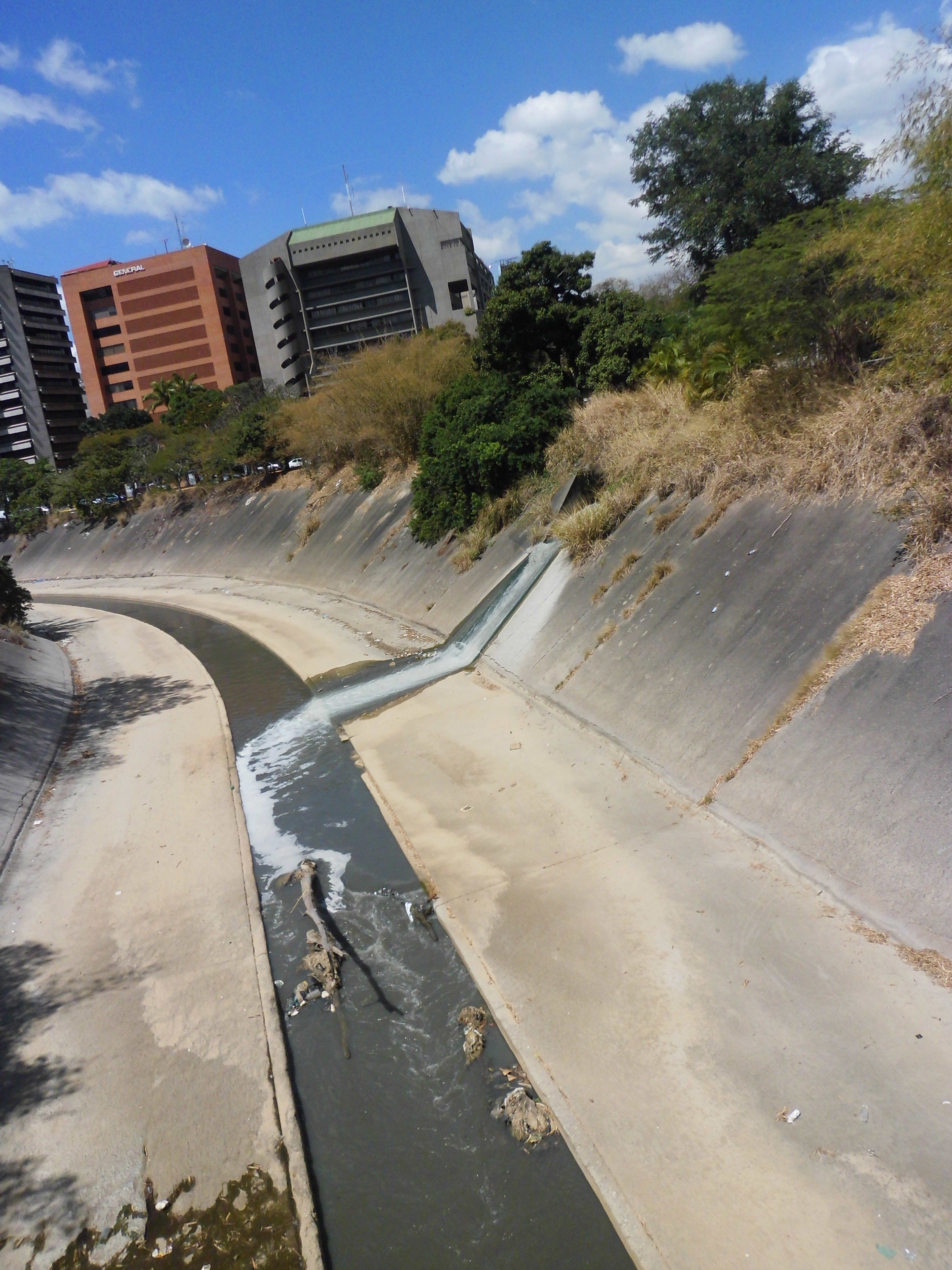 Boca de la quebrada Agua de Maíz sobre el curso del río Guaire, en municipio Chacao estado Miranda – Venezuela. Nota: el curso del río Guaire reprimido por reparaciones en el embaulado del mismo (febrero 2013)